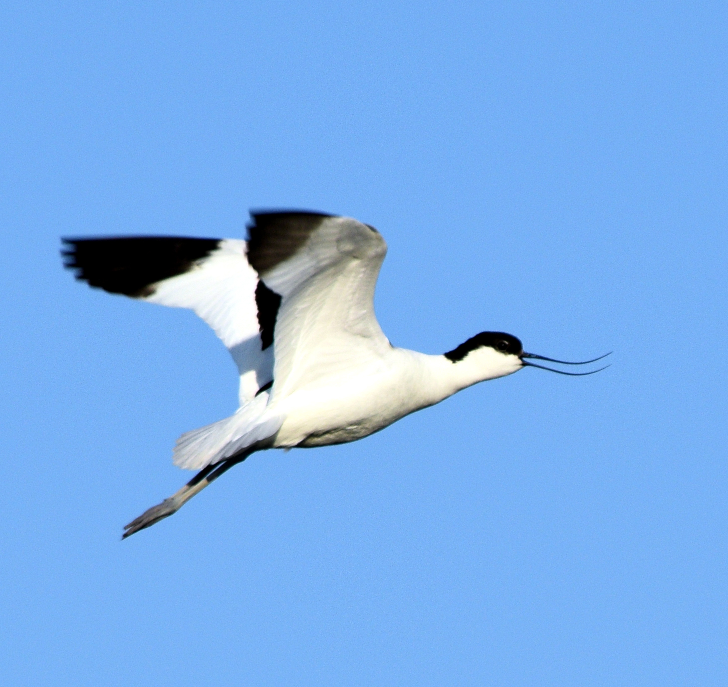 Hier sieht man einen Säbelschnäbler (Recurvirostra avosetta) im Flug.